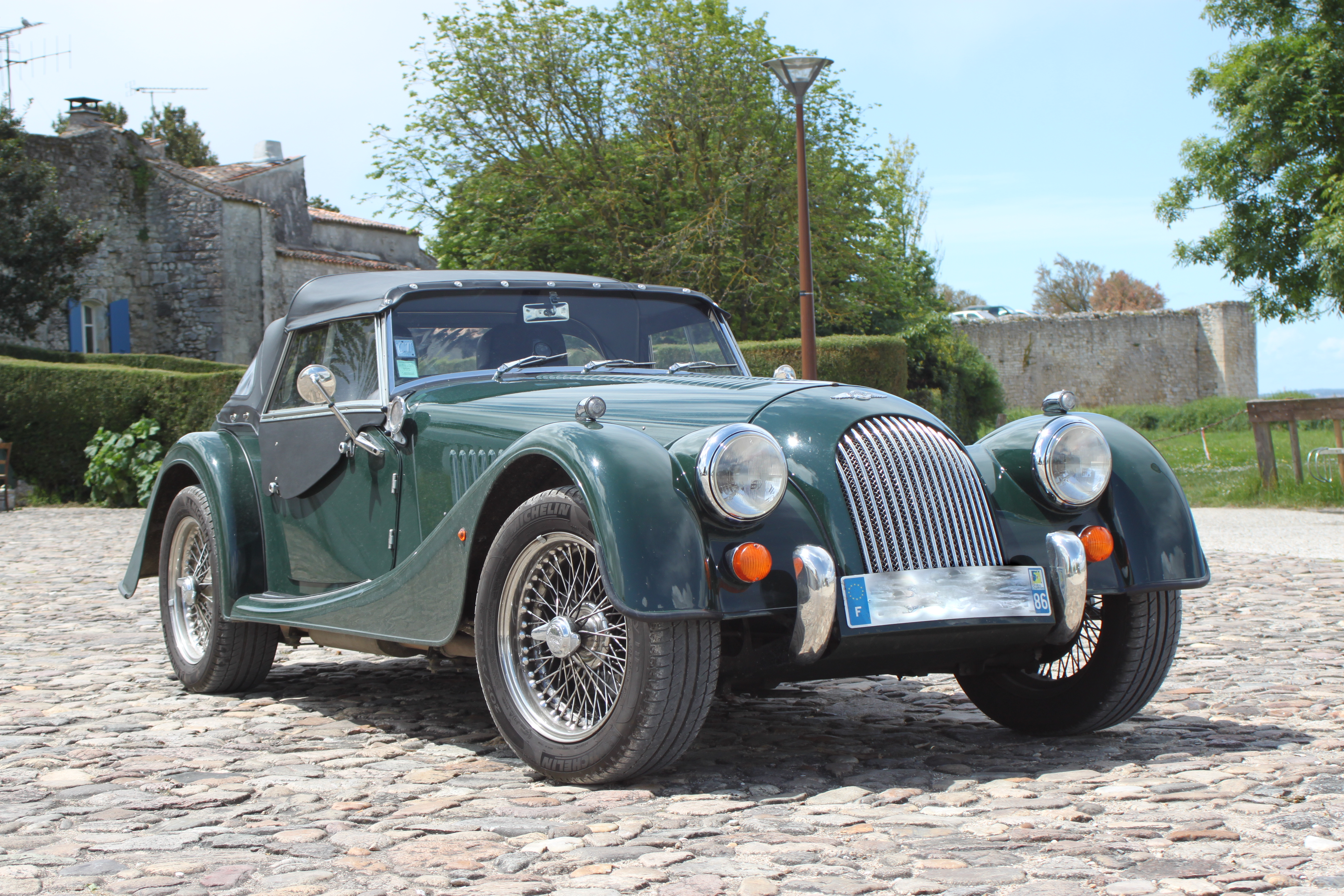 Morgan 4/4 LeMans 62.